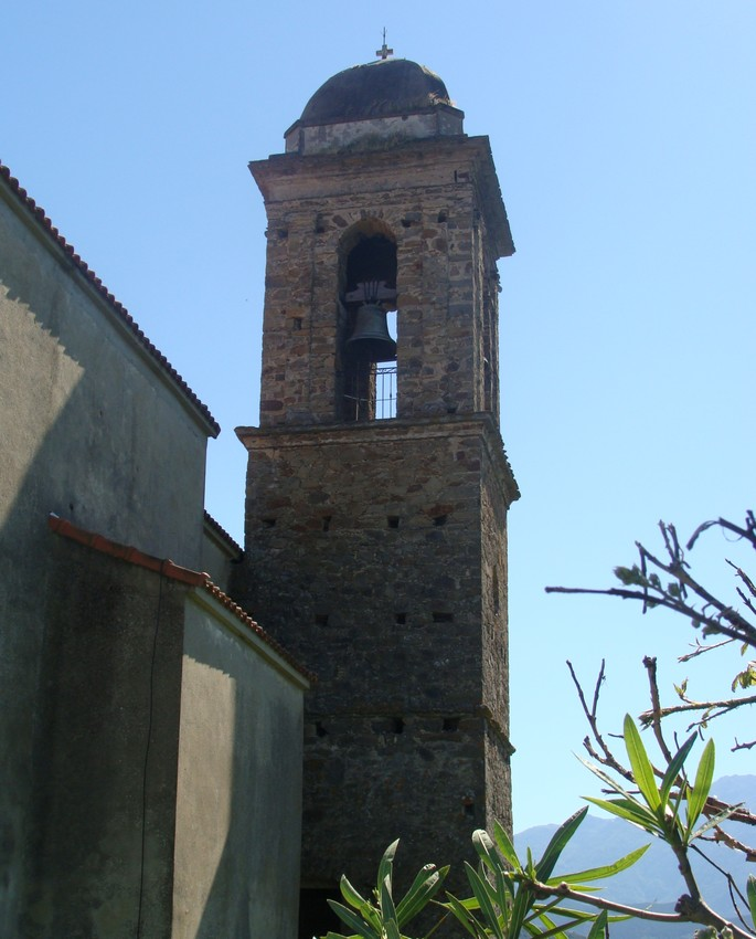 Le clocher de l'église de Serra-di-Fiumorbo.